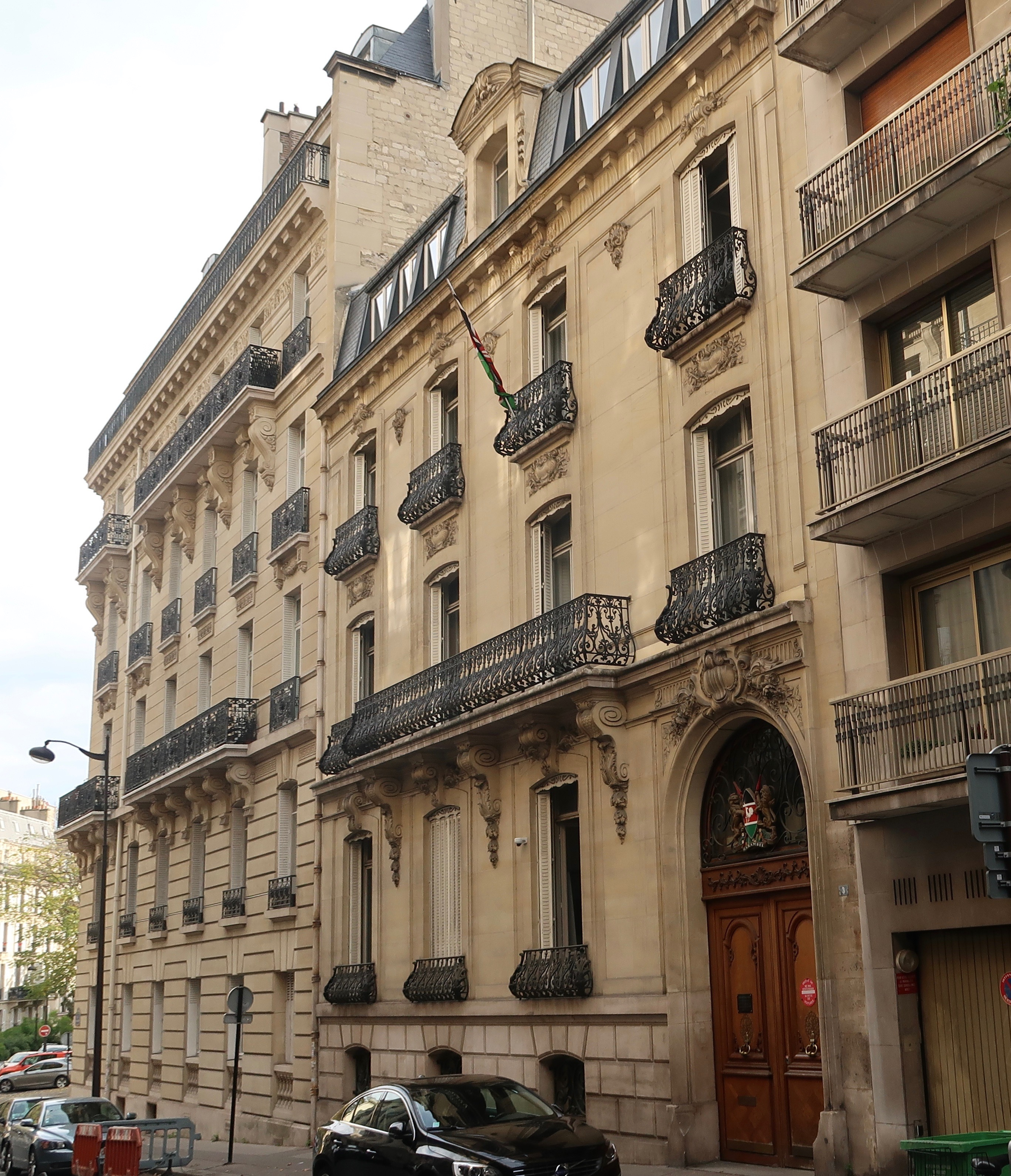 Ambassade du Kenya en France, 3 rue Freycinet (Paris 16e).